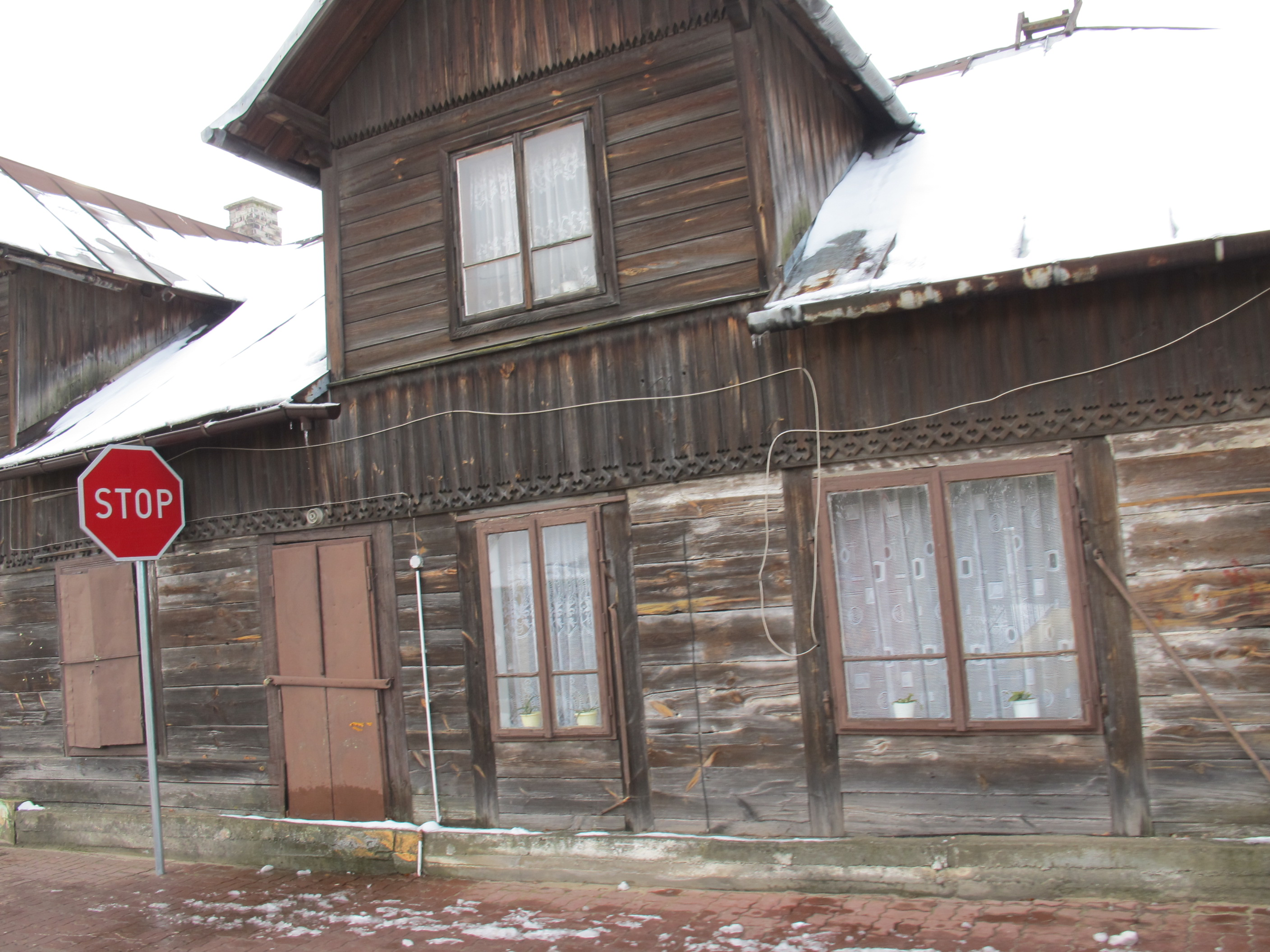 טירה עתיקה בדלוגושיודלו.